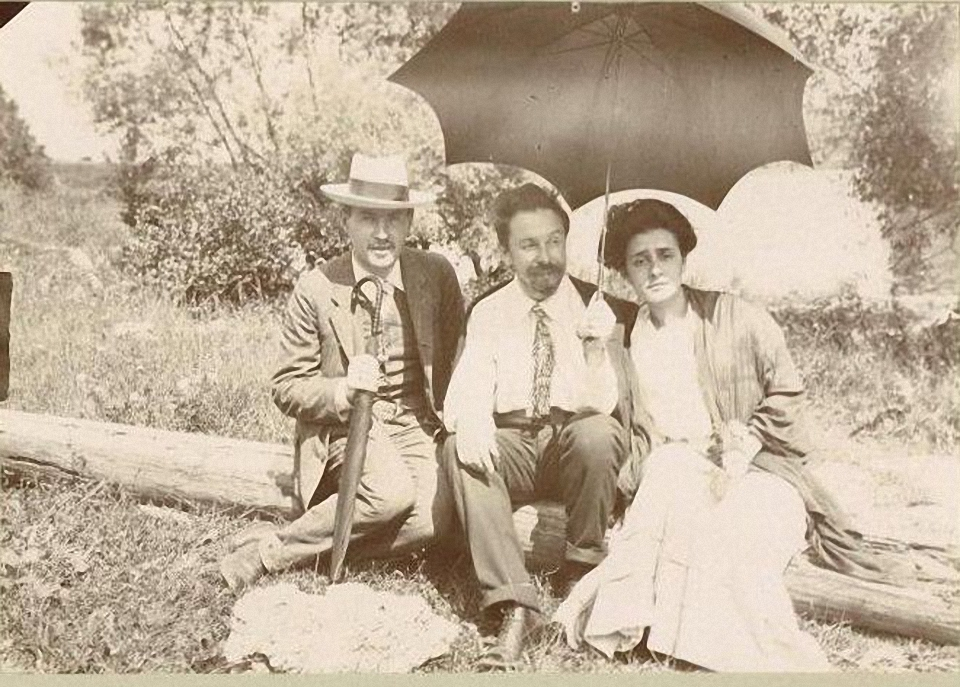 Леонид Сабанеев, Александр Скрябин и Татьяна Шлёцер на отдыхе летом 1912 года на Оке, фотография по-видимому или самого Л.Л.Сабанеева или Мозера